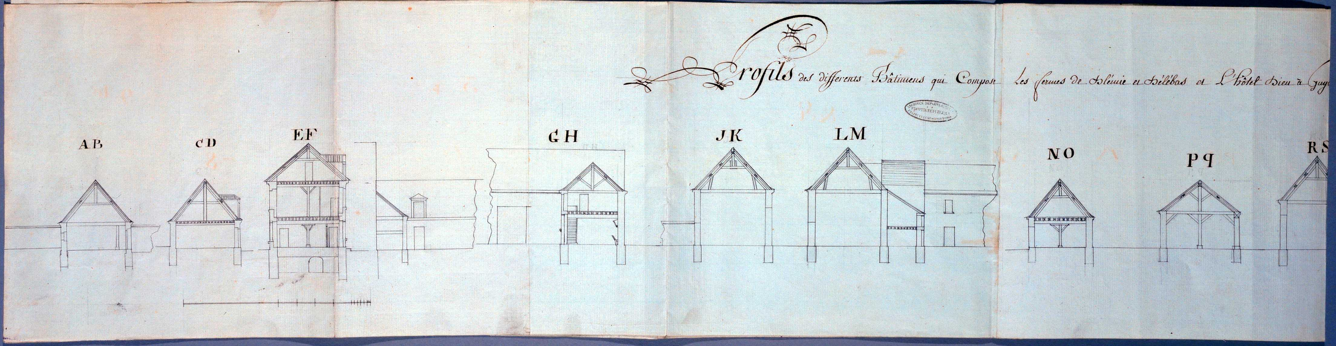 texte : Profils des differents Bâtimens qui Compose les fermes de Blénie et Bélébas et L’hôtel Dieu à Guyancourt; Plans de la ferme Bel Ebat (l’une des sept fermes de Guyancourt et Hôtel Dieu à Guyancourt dans le département français des Yvelines (page 1). 24 × 186 cm (9.4 × 73.2 in)